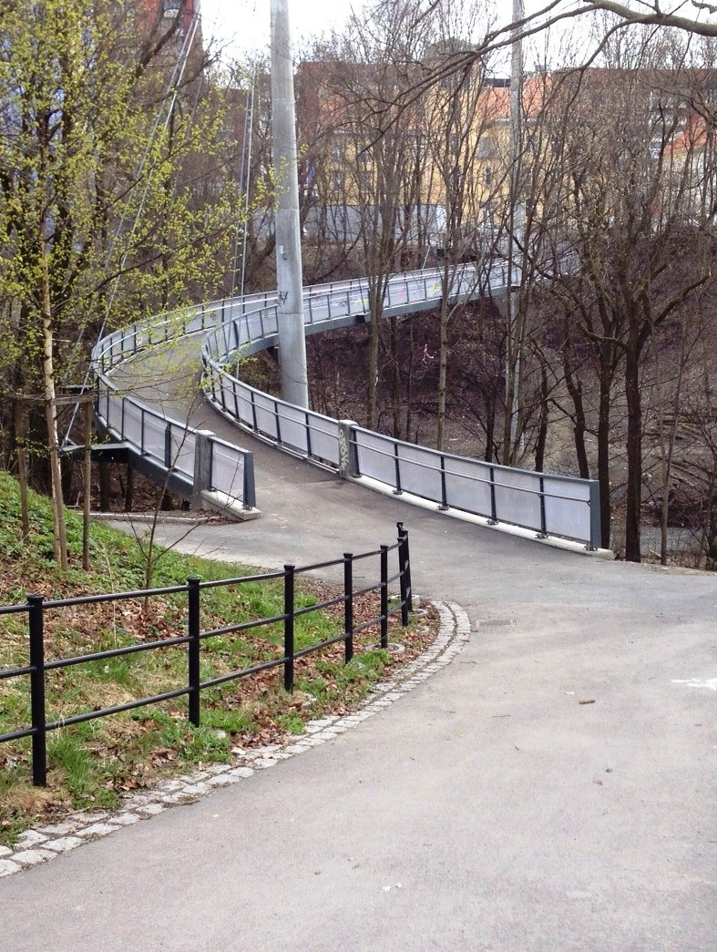 Jersusalem Bro, Akerselva, Oslo